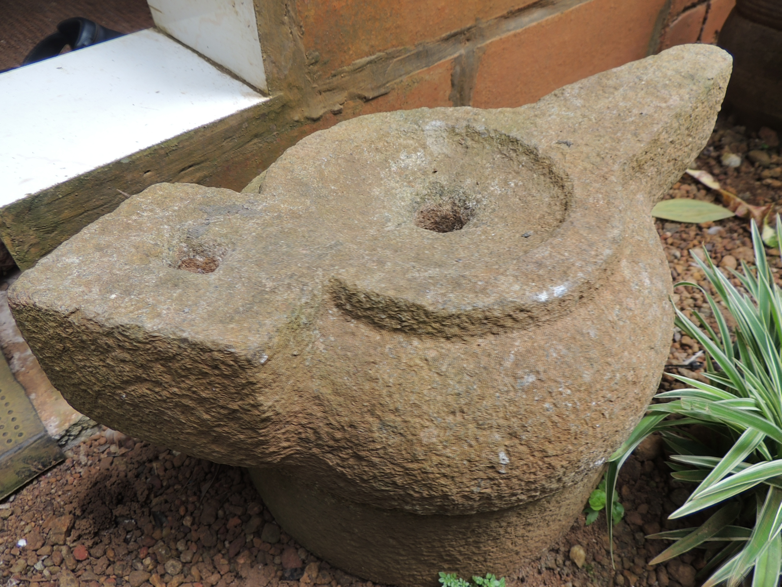 തിരികല്ല്‌ : ധാന്യങ്ങൾ പൊടിക്കാനും തൊലികളയാനും ഒക്കെ ഉപയോഗിച്ചിരുന്നു